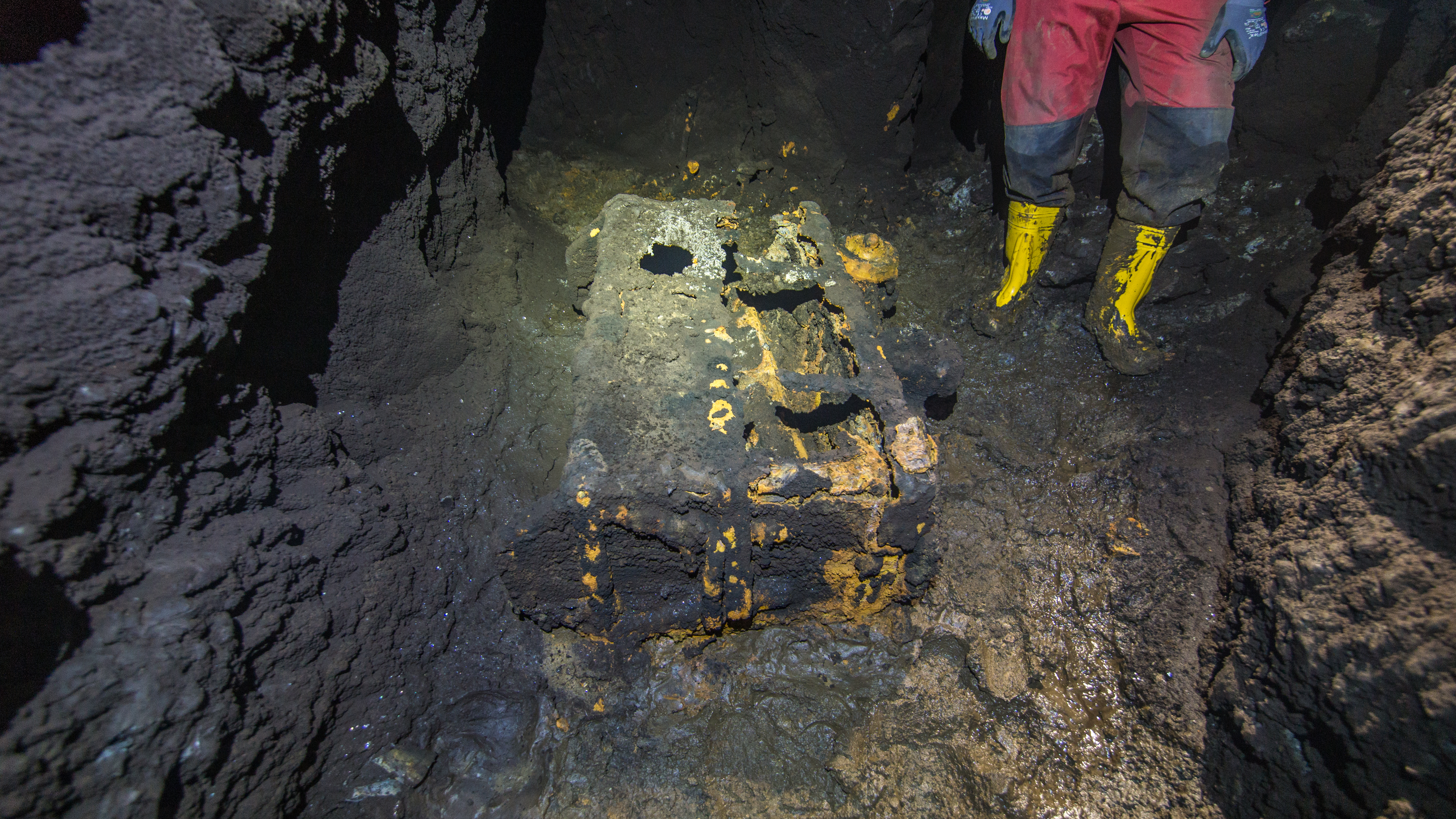 Spurnagelhunt